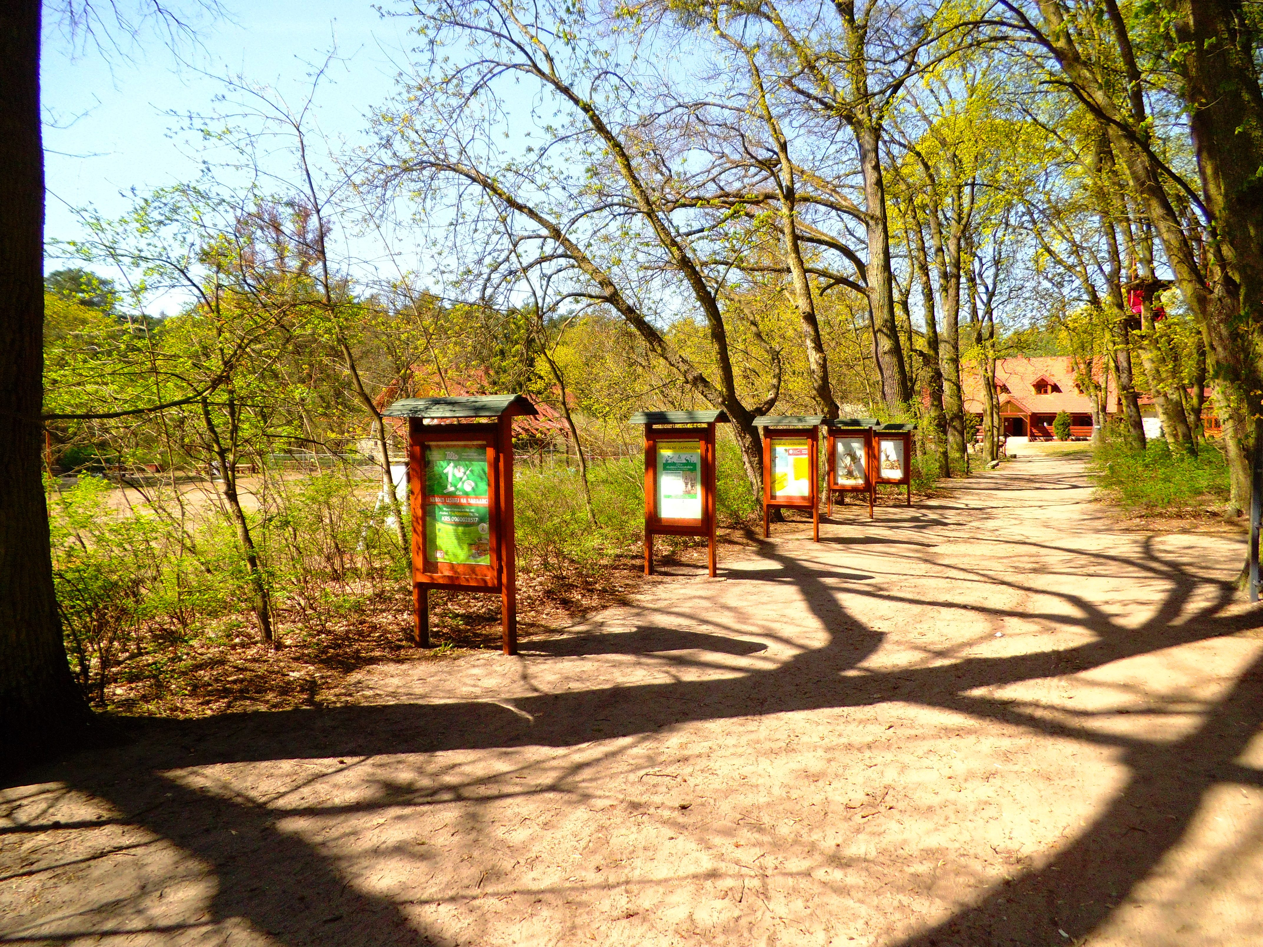 Ścieszka edukacyjna w Toruniu